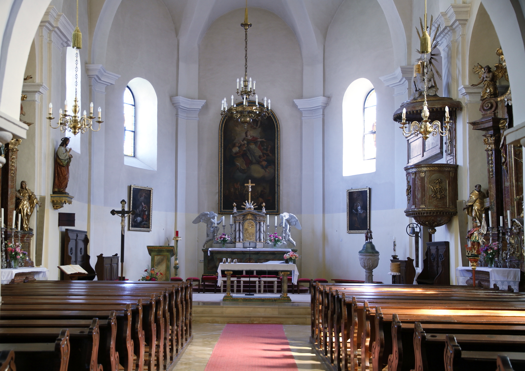 Innenansicht der kath. Pfarrkirche hl. Kunigund in der burgenländischen Marktgemeinde Breitenbrunn am Neusiedler See.